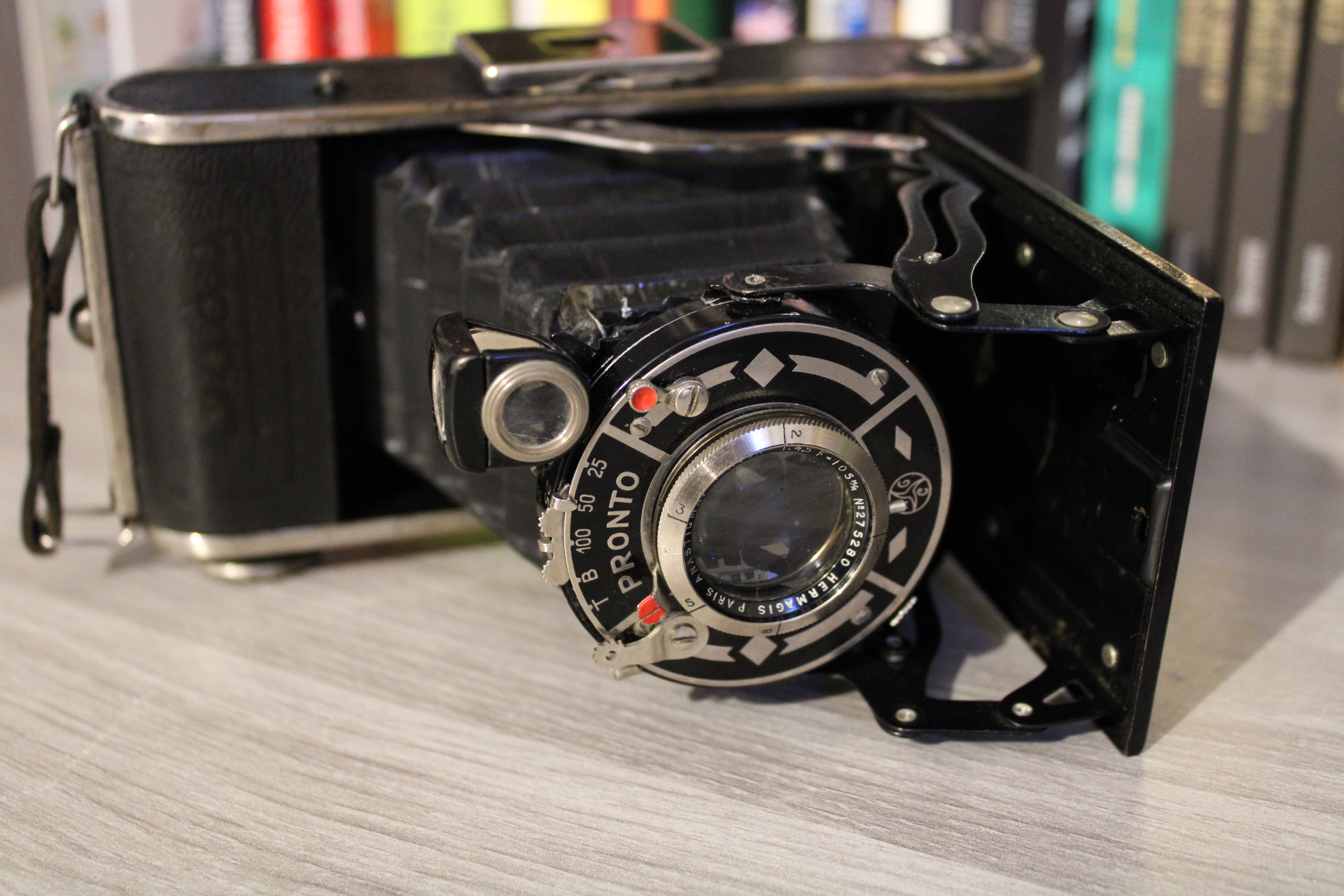 Un appareil photo argentique à soufflet datant de la Seconde Guerre Mondiale.